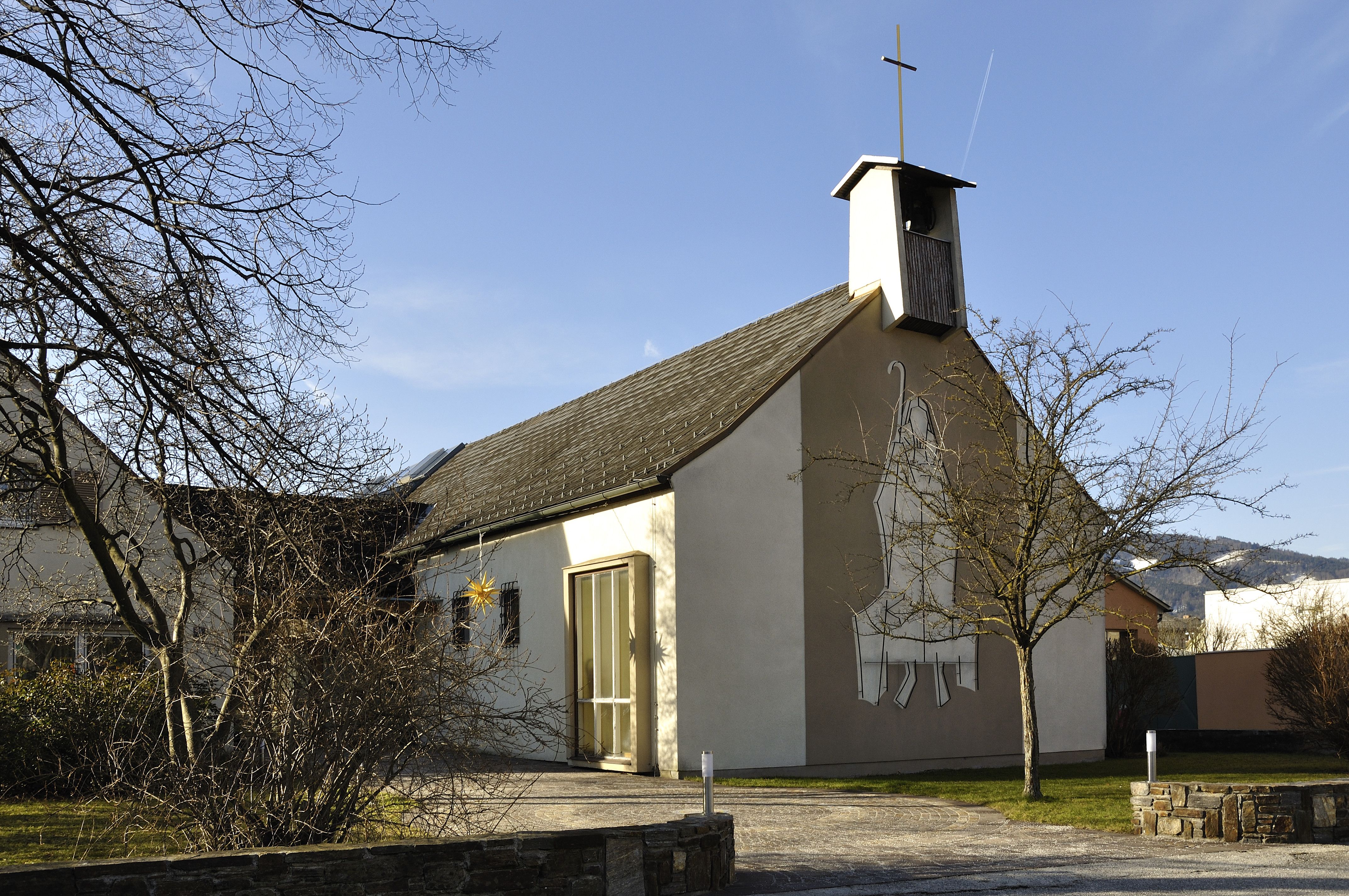 Evang. Pfarrkirche A.B.